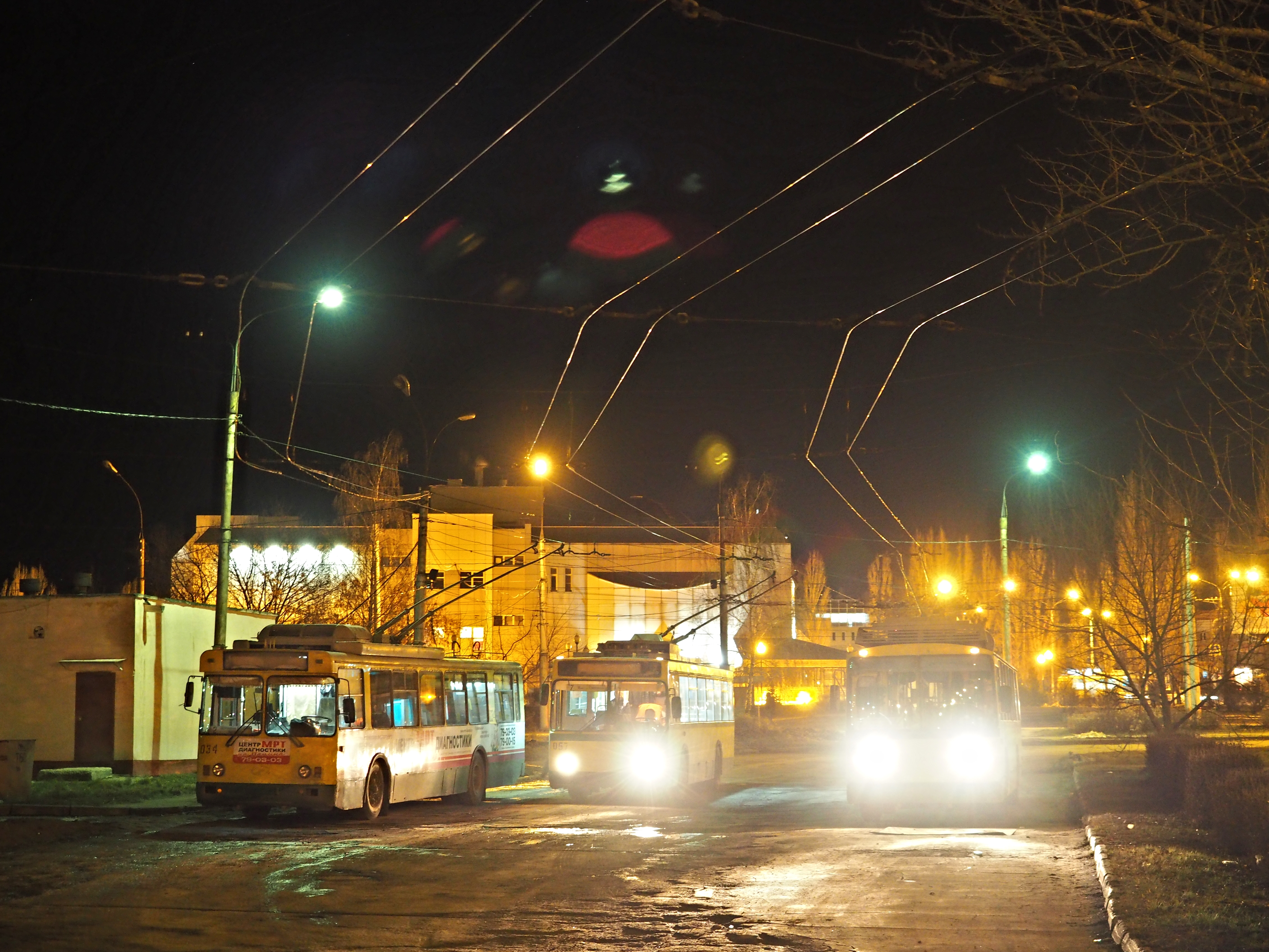 Липецк, троллейбусы на к/ст "Кольцо 9 микрорайона"